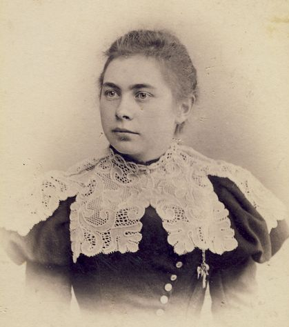 Felicija Bortkevičienė